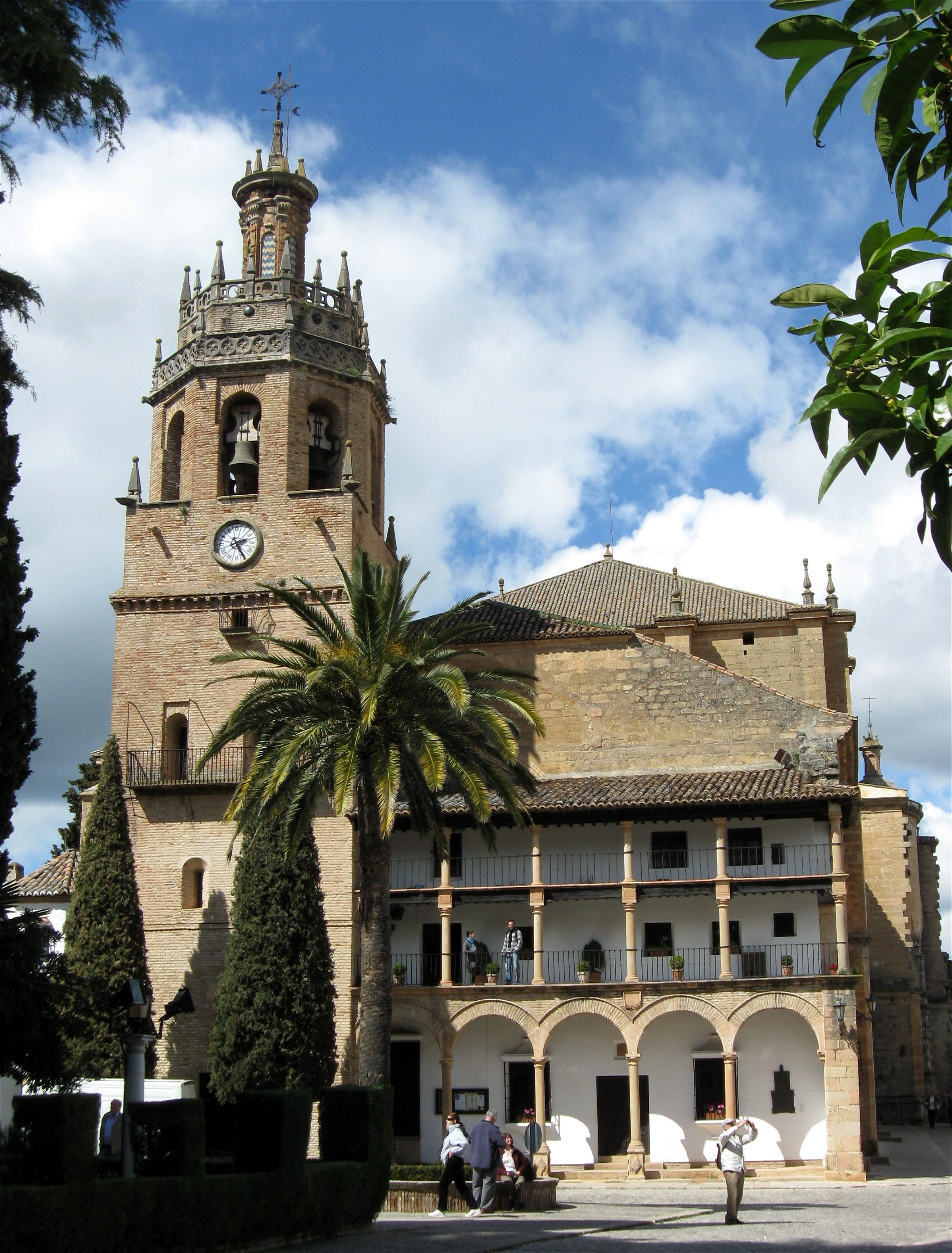 Santa María la Mayor, Ronda, Málaga